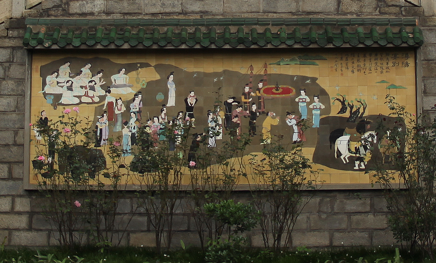 九江琵琶亭浔阳宴别图